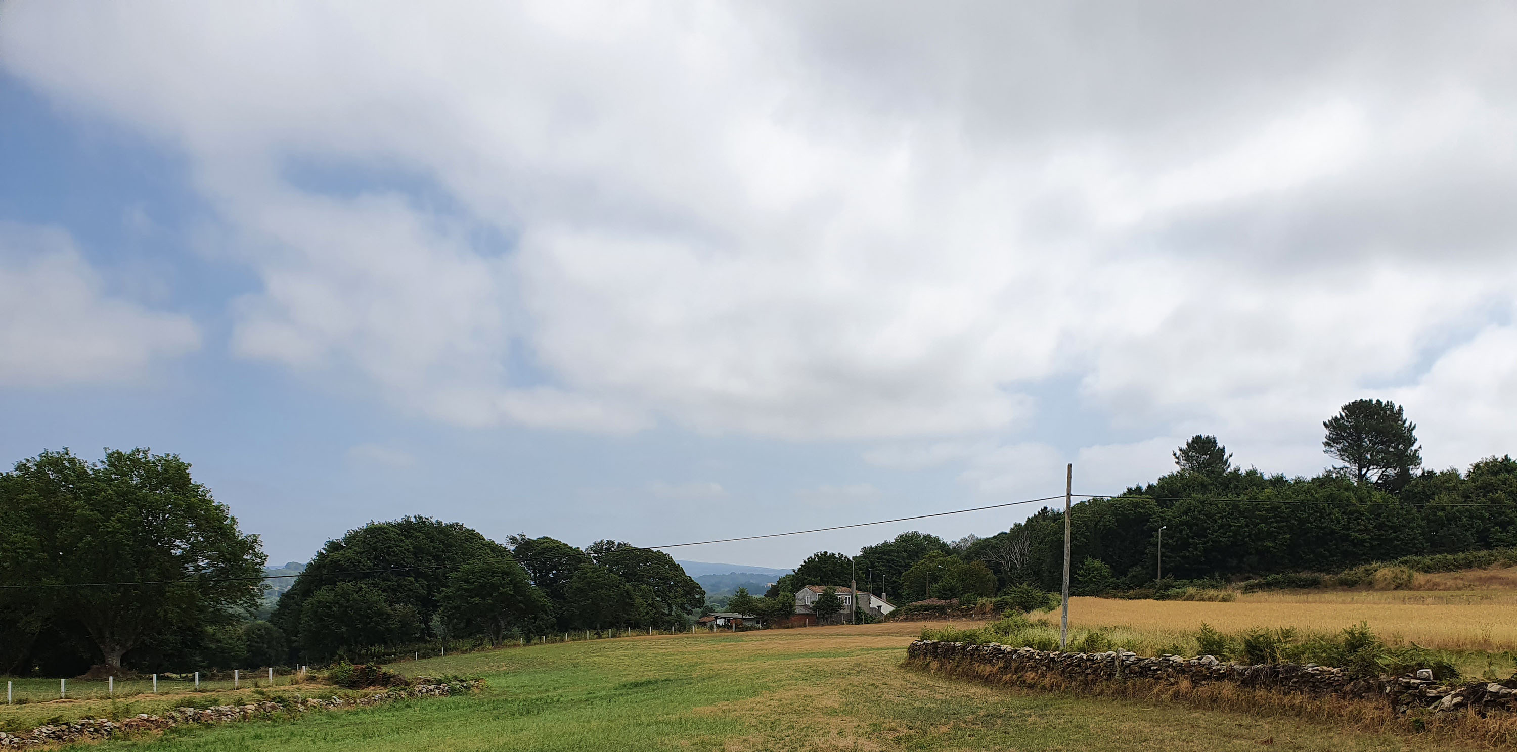 Lugar de Casforno, na parroquia de Dorra, Concello de Antas de Ulla.